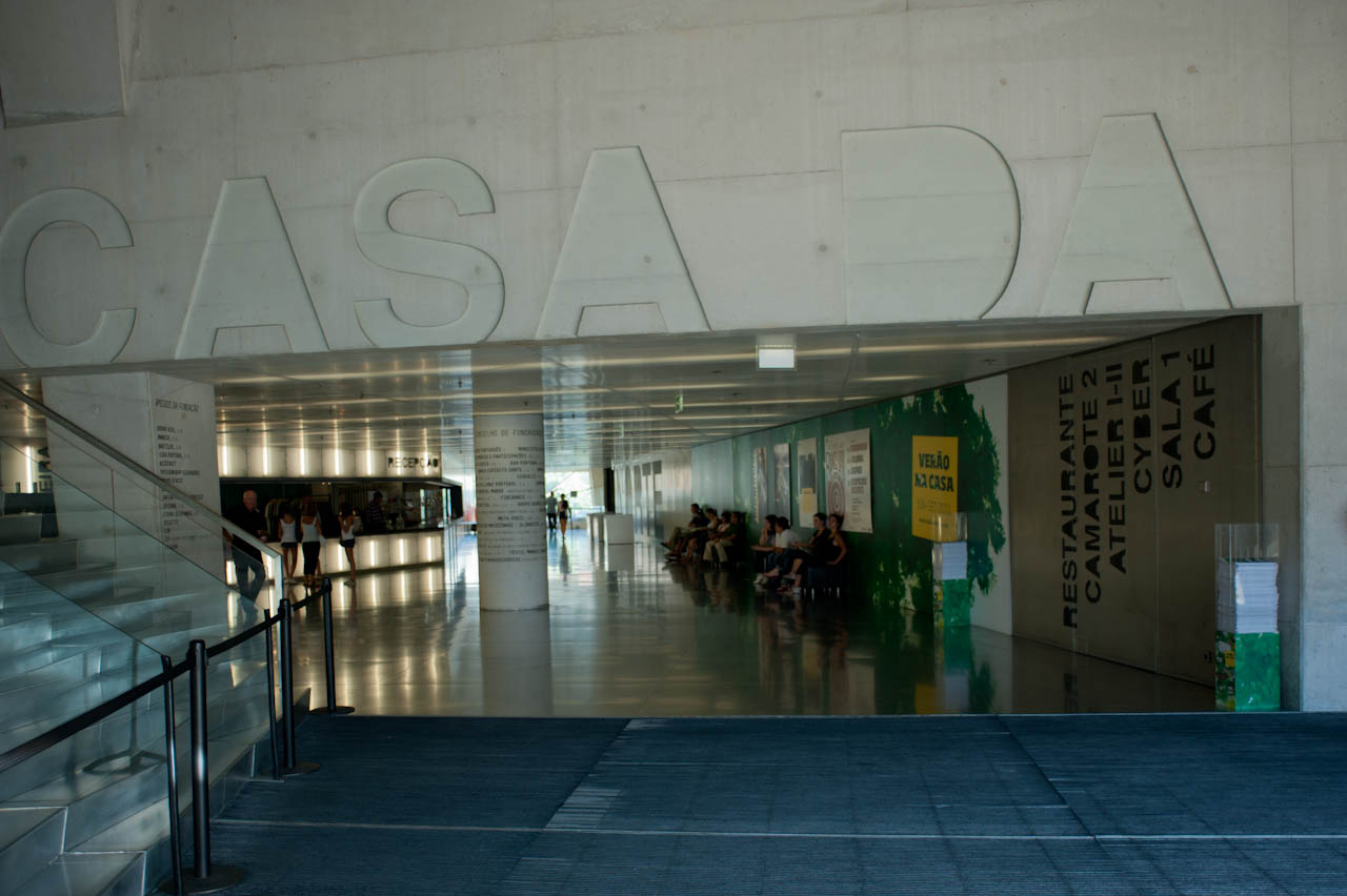 Casa Das Musica Porto Portugal Rem Koolhaas 2005 2011-08-19